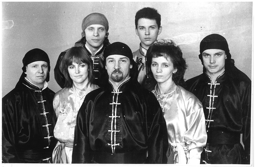 Групповое фото коллектива "Пять Зверей", 1989г